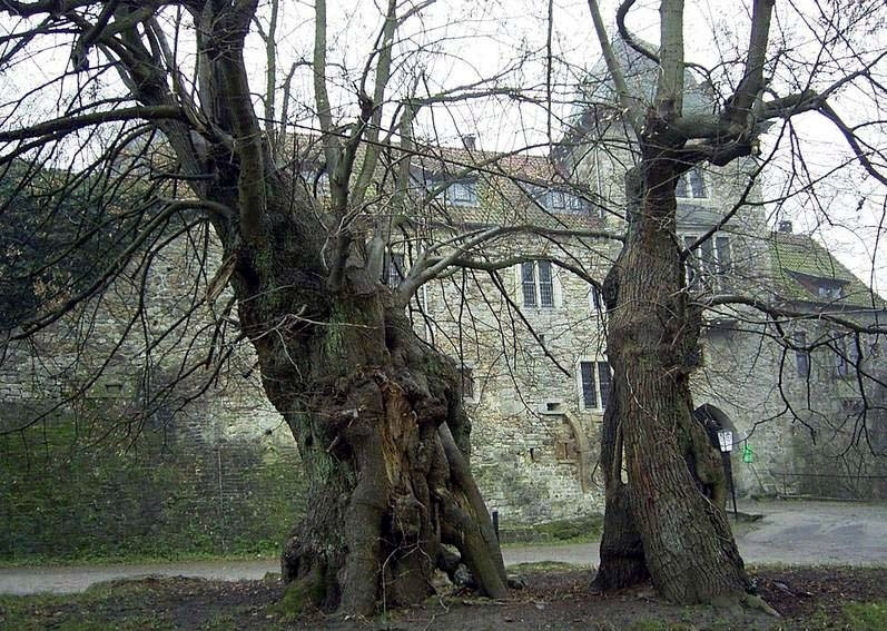 Die „Blutlinde“ (ein Gerichtsbaum) auf dem Platz vor dem Burgeingang der Schaumburg, Rinteln im Weserbergland.